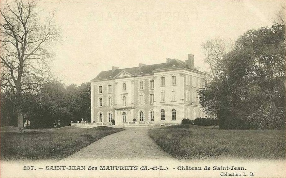 Carte postale, château de Saint-Jean à Saint-Jean-des-Mauvrets, Maine-et-Loire, France.